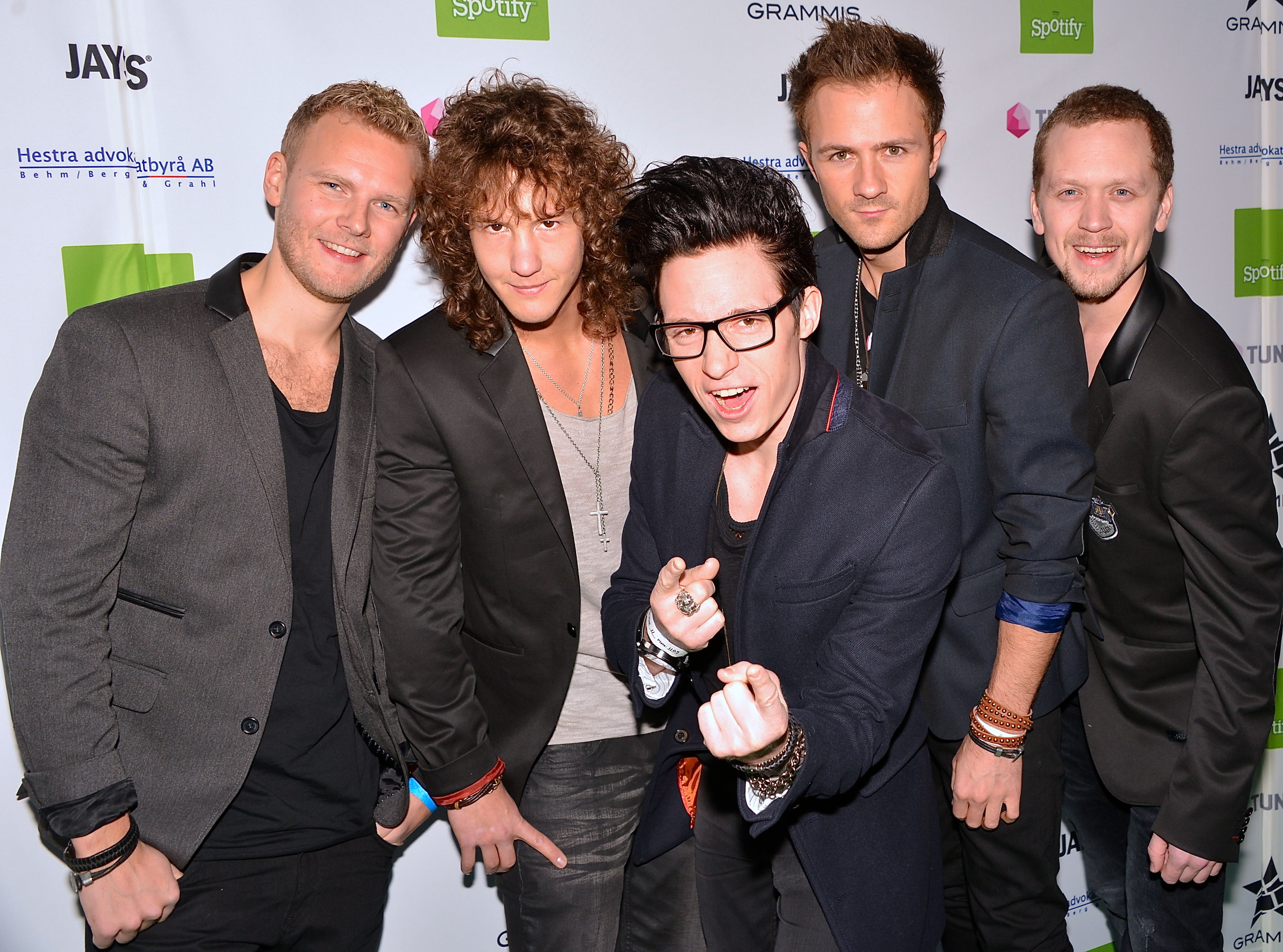 State of Drama på Grammisgalan på Cirkus, Stockholm den 20 februari 2013.